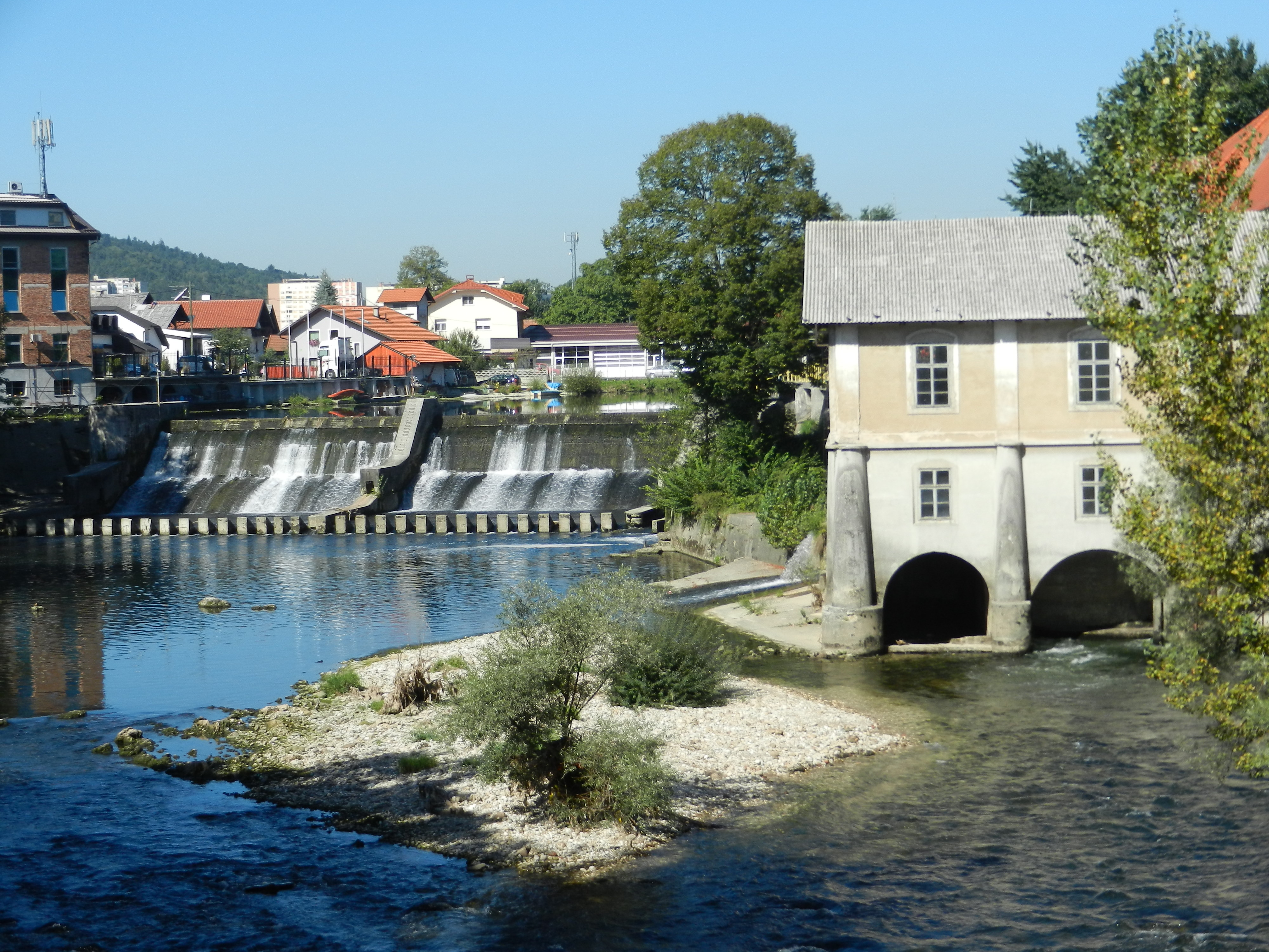 Jez za hidroelektrarno pri gradu Fužine v Ljubljani.